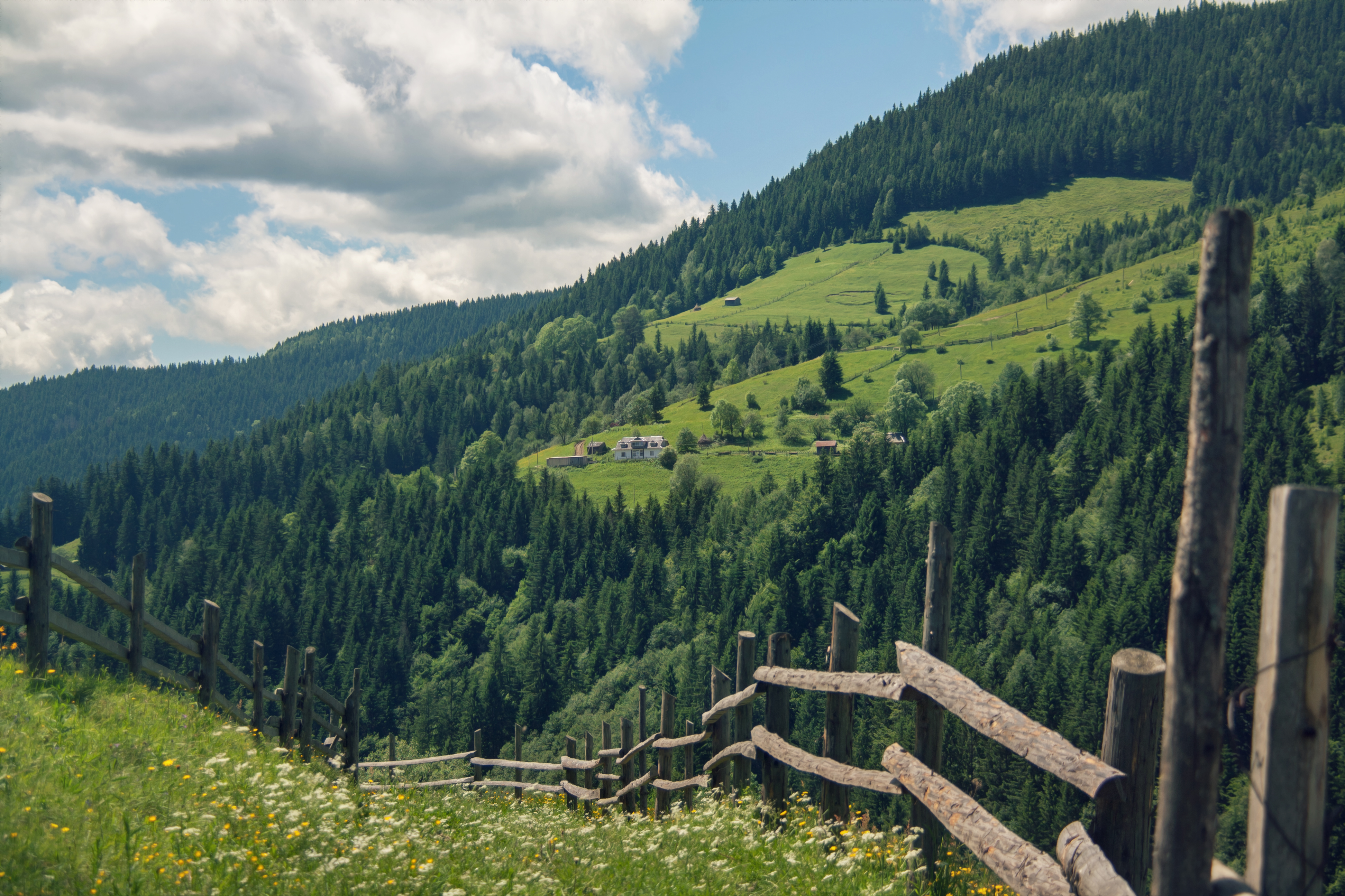 Cárpatos. Berezhnytsya, Ucrania